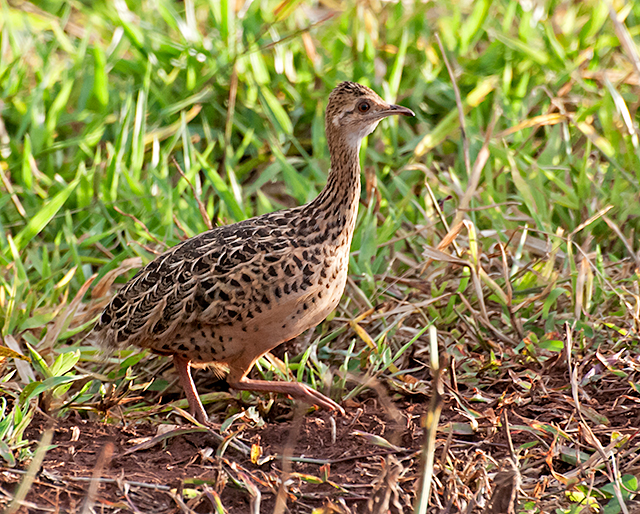 Piraju-SP - Brasil